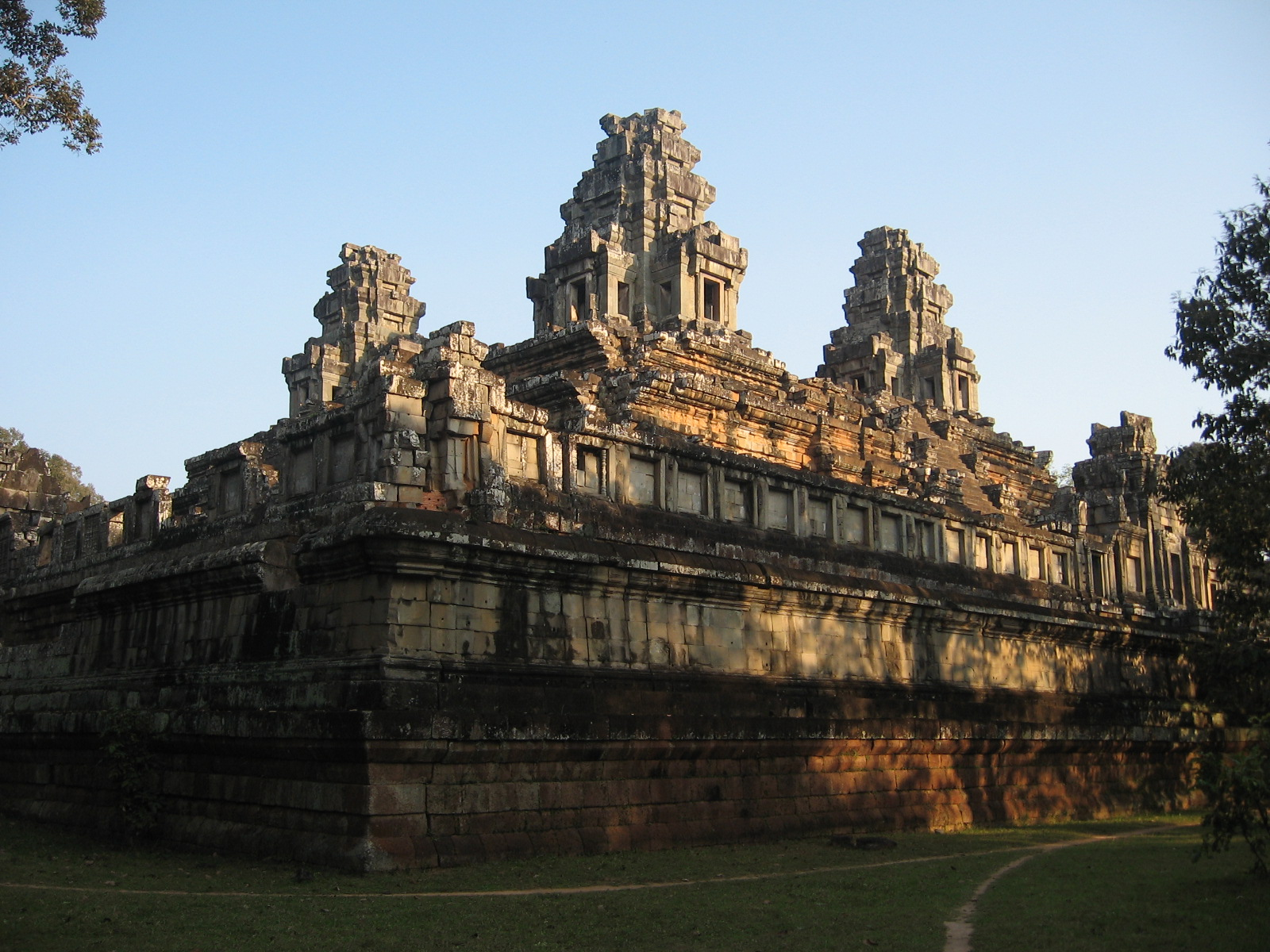 Takeo gây một ấn tượng sâu sắc - nó là ngôi đền " không may mắn " nhất trong quần thể Angkor - chụp vào lúc sắp hoàng hôn , rợn người và hoang lạnh - Phan Minh Châu chụp tại Angkor Thom